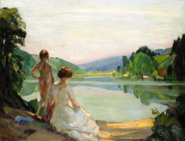 Gemälde von Ernst Hodel Junior.